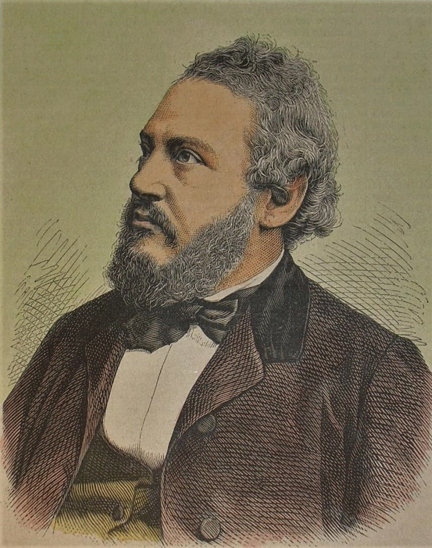 Heinrich Landesmann (Hieronymus Lorm), teilkolorierter Holzstich, ca. 15 x 12 cm